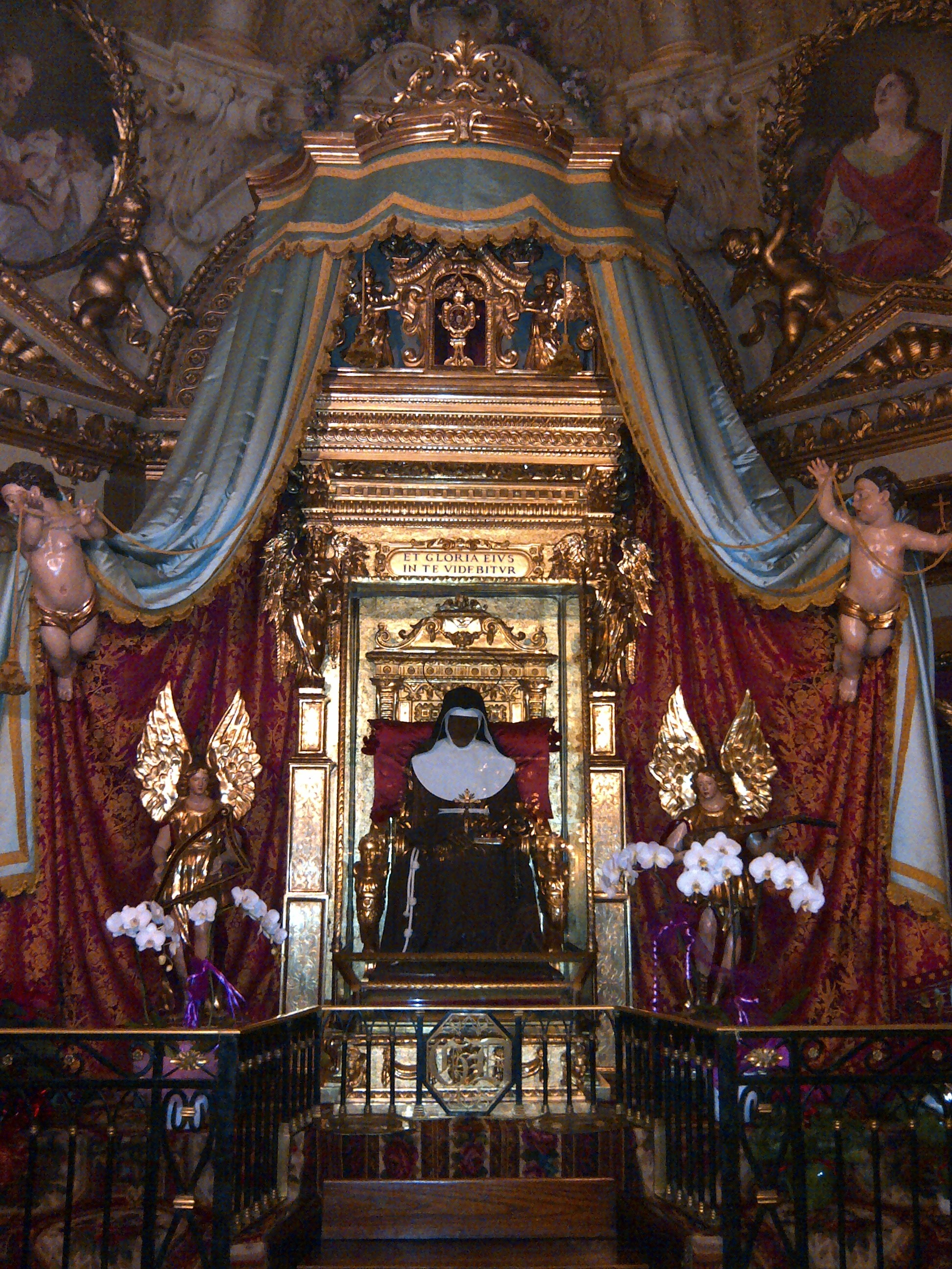 Il corpo incorrotto di Santa Caterina, seduta in trono, come si presenta ai fedeli nella cappella custodita all'interno della chiesa del Corpus Domini di Bologna.